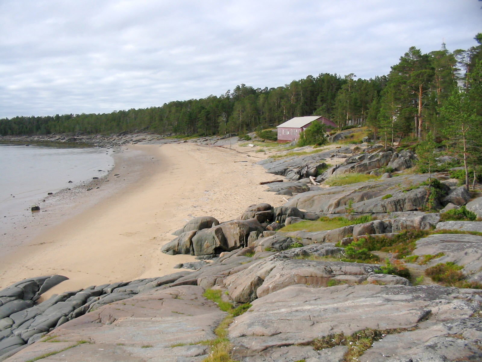 Kiy-island (Кий-остров), White Sea, Russia July-August 2006